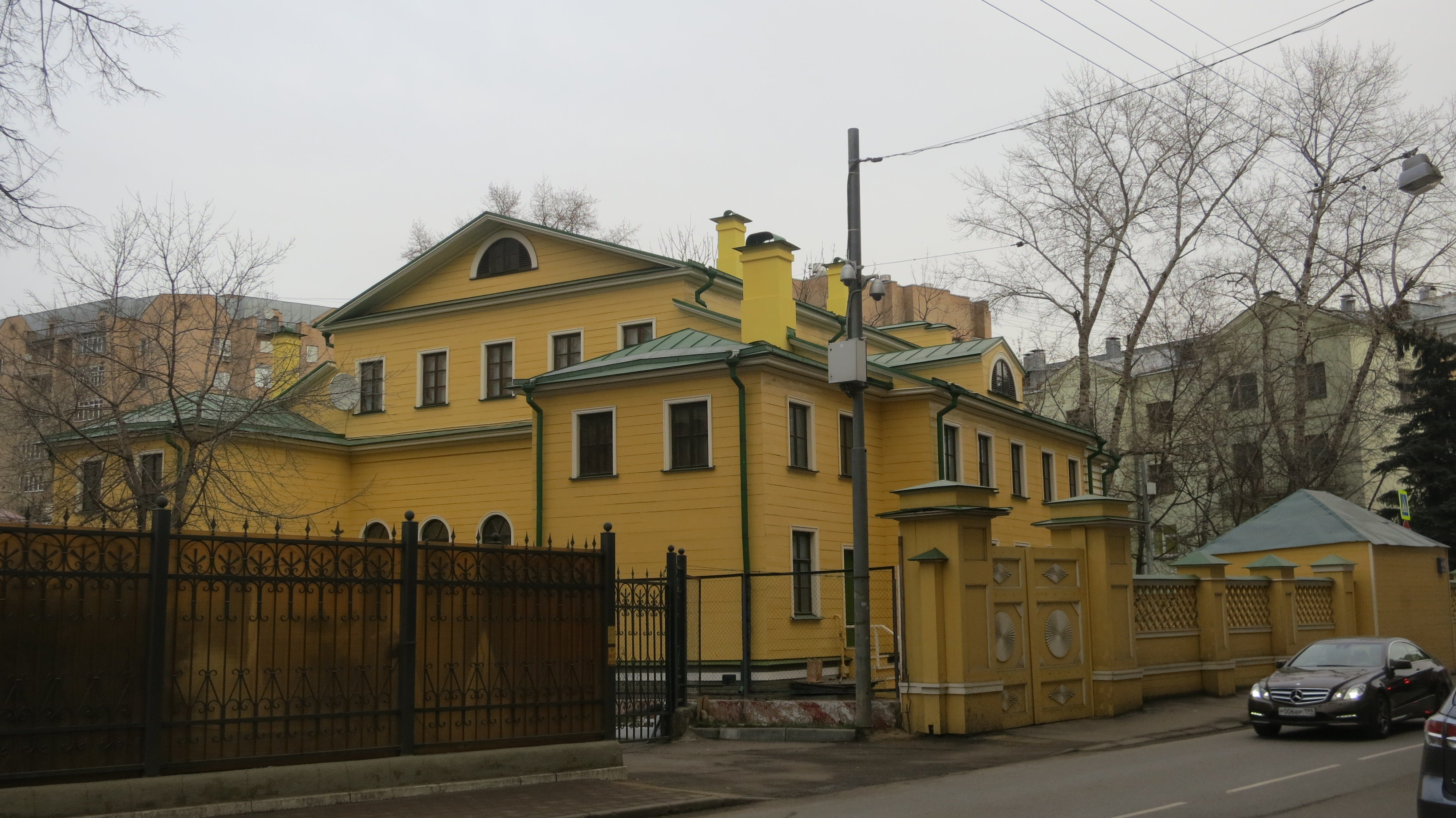 Дом (деревянный): Денежный пер., дом 9/6, Арбат, Центральный округ, Москва